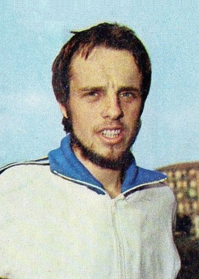 SPORT VEDETTES-PANINI 1974-Figurina n.19- VIREN - FINLANDIA -ATLETICA-Rec